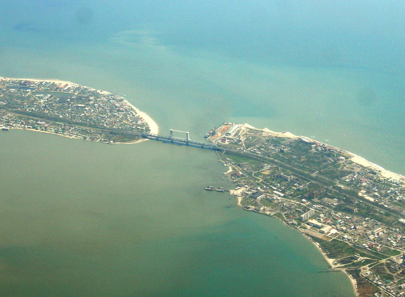 Днестровско-Цареградское гирло